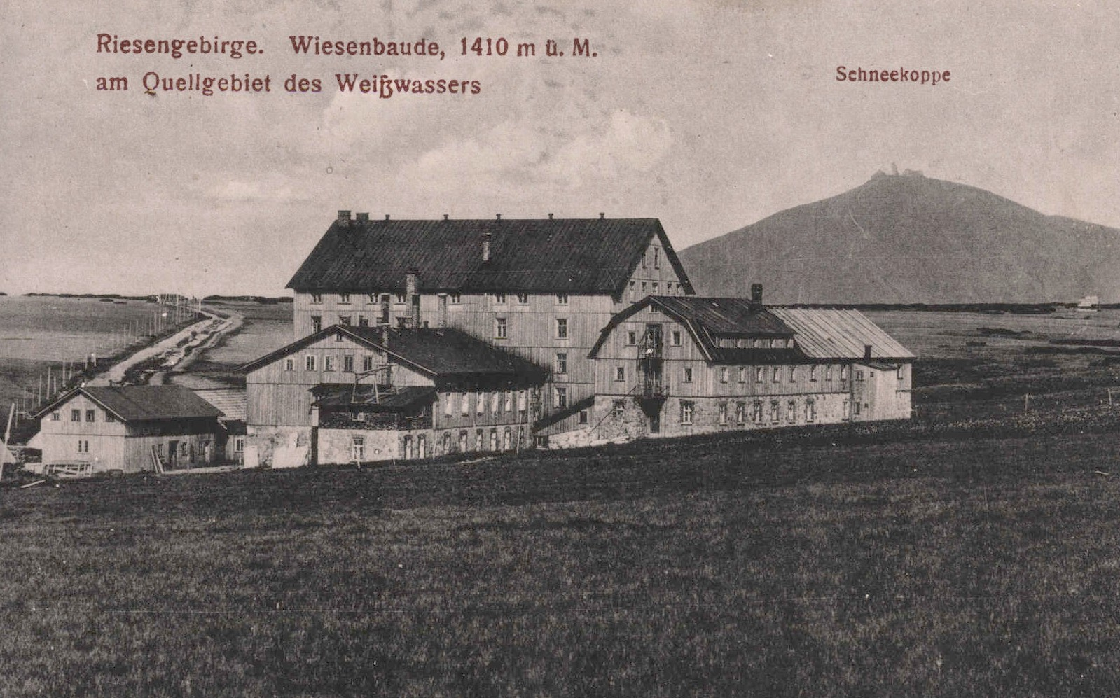 Hostel "Wiesenbaude" (now "Luční bouda") in Giant Mountains (German:Riesengebirge